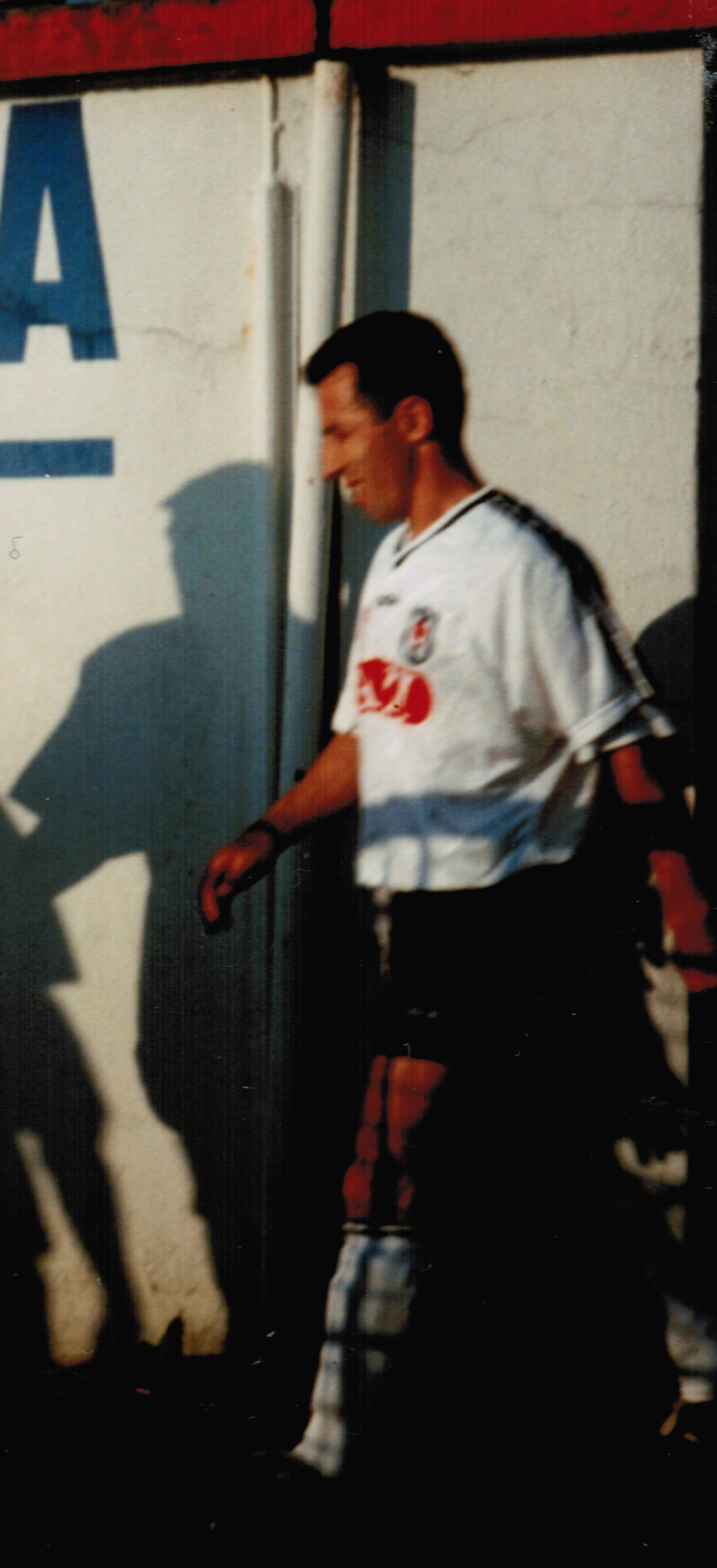 Recep Cetin, während eines Freundschaftspiels zwischen Besiktas und Türkiyemspor in Berlin, 1995